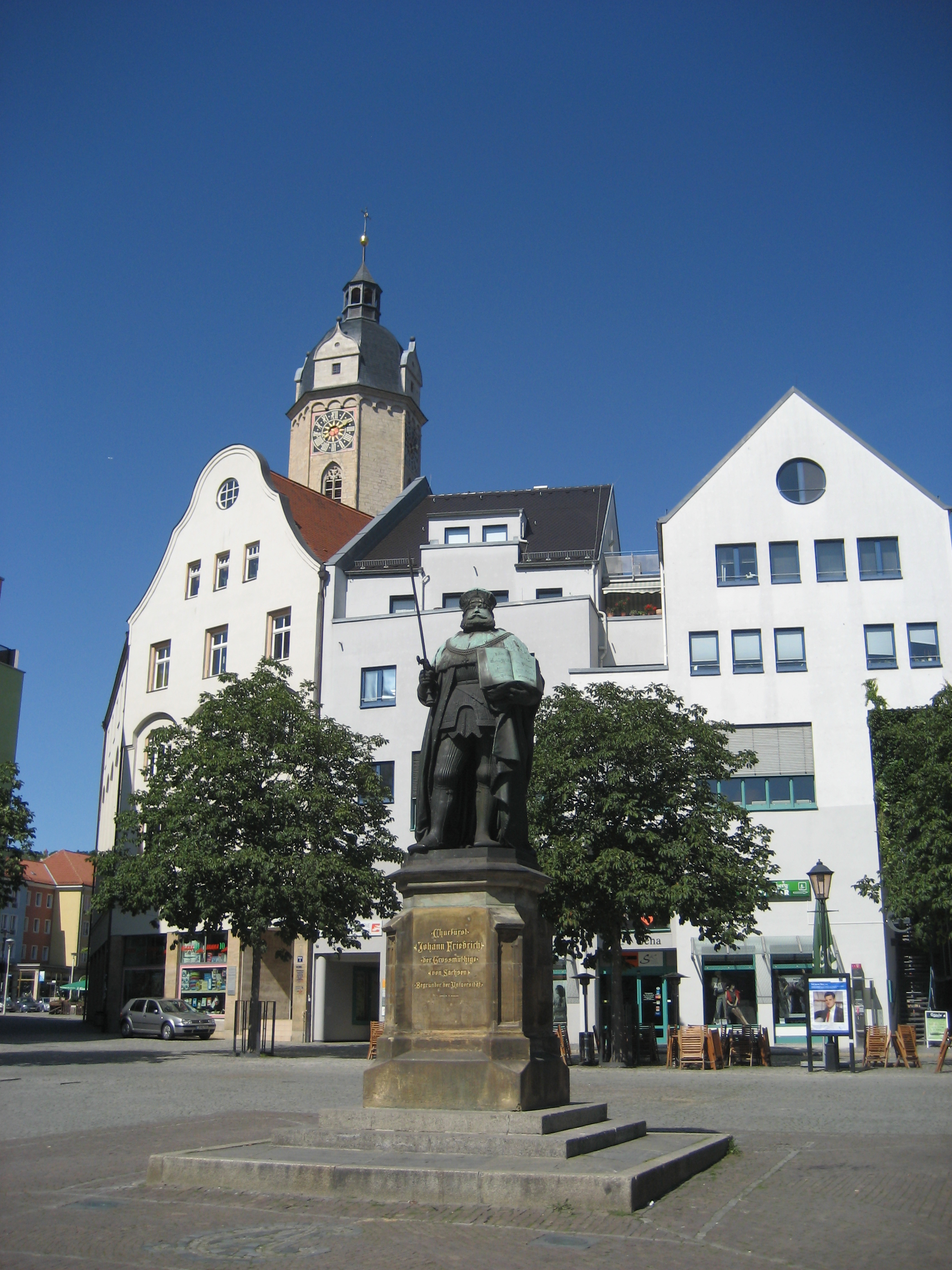 Denkmal von Johann Friedrich I. (Sachsen), der ab 1546 der Reichsacht unterlag und nach dem Verlust der Universität zu Wittenberg die Hohe Schule in Jena gründete.